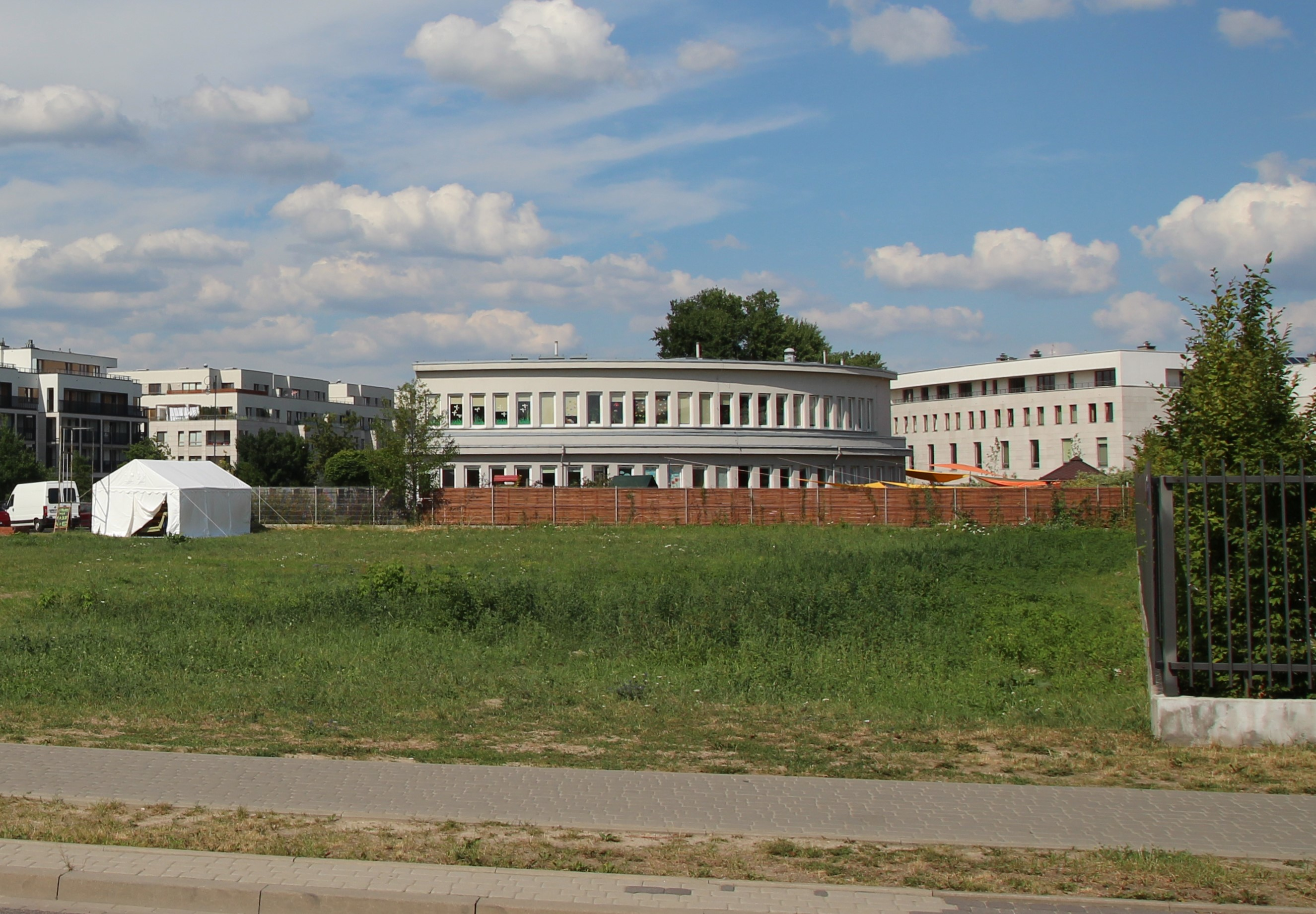 Ledóchowskiej , German kindergarten